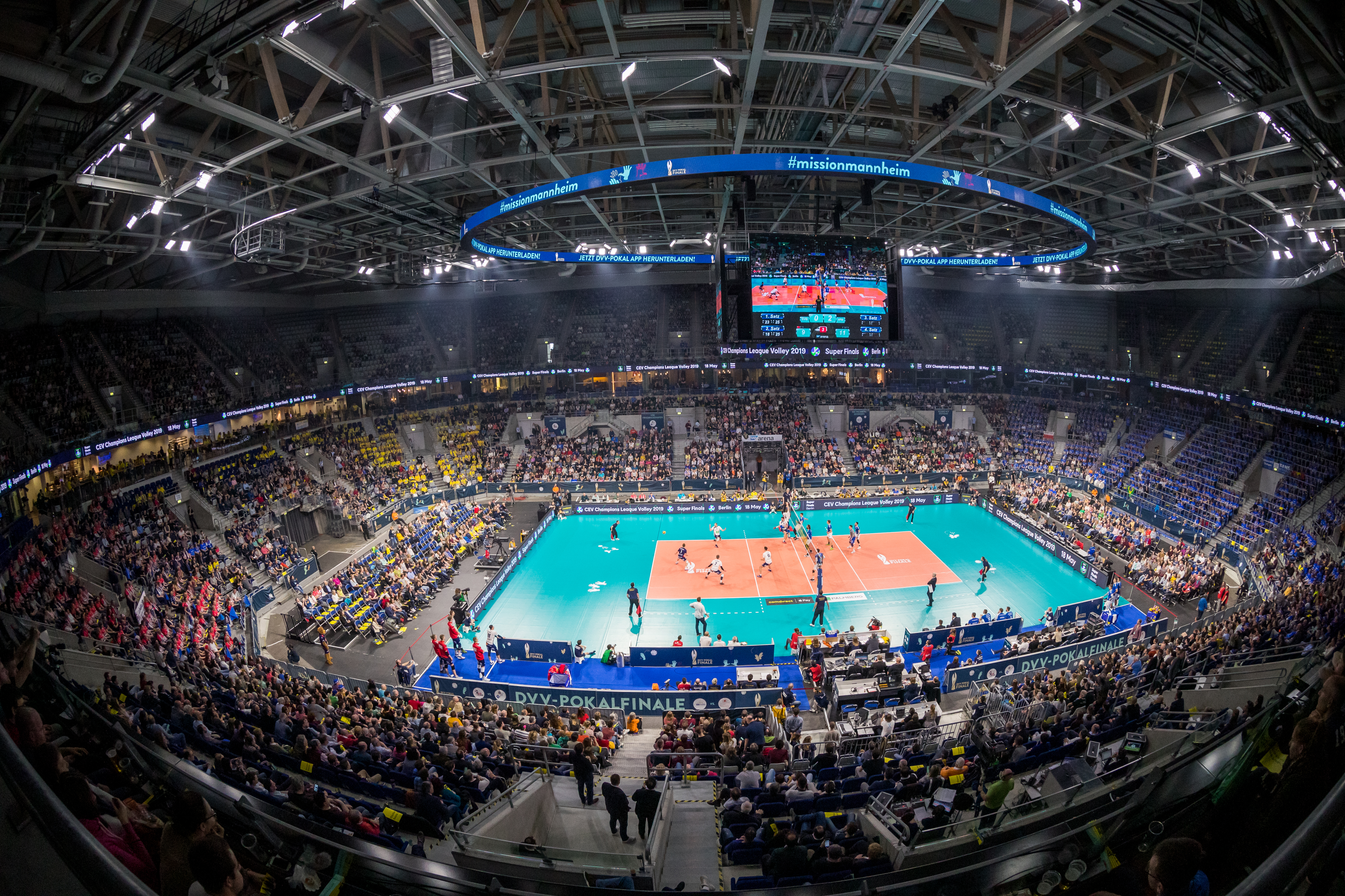 SVG Lüneburg - VfB Friedrichshafen at SAP Arena, Mannheim, Baden-Württemberg, Germany on 2019-02-24, Photo: Sven Mandel Result: 0:3 / 57:75 (23:25 18:25 16:25)